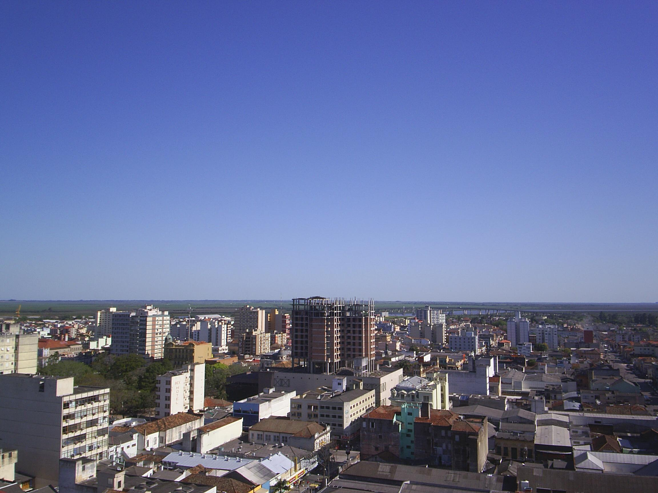 Terraço do Hotel Manta, em Pelotas